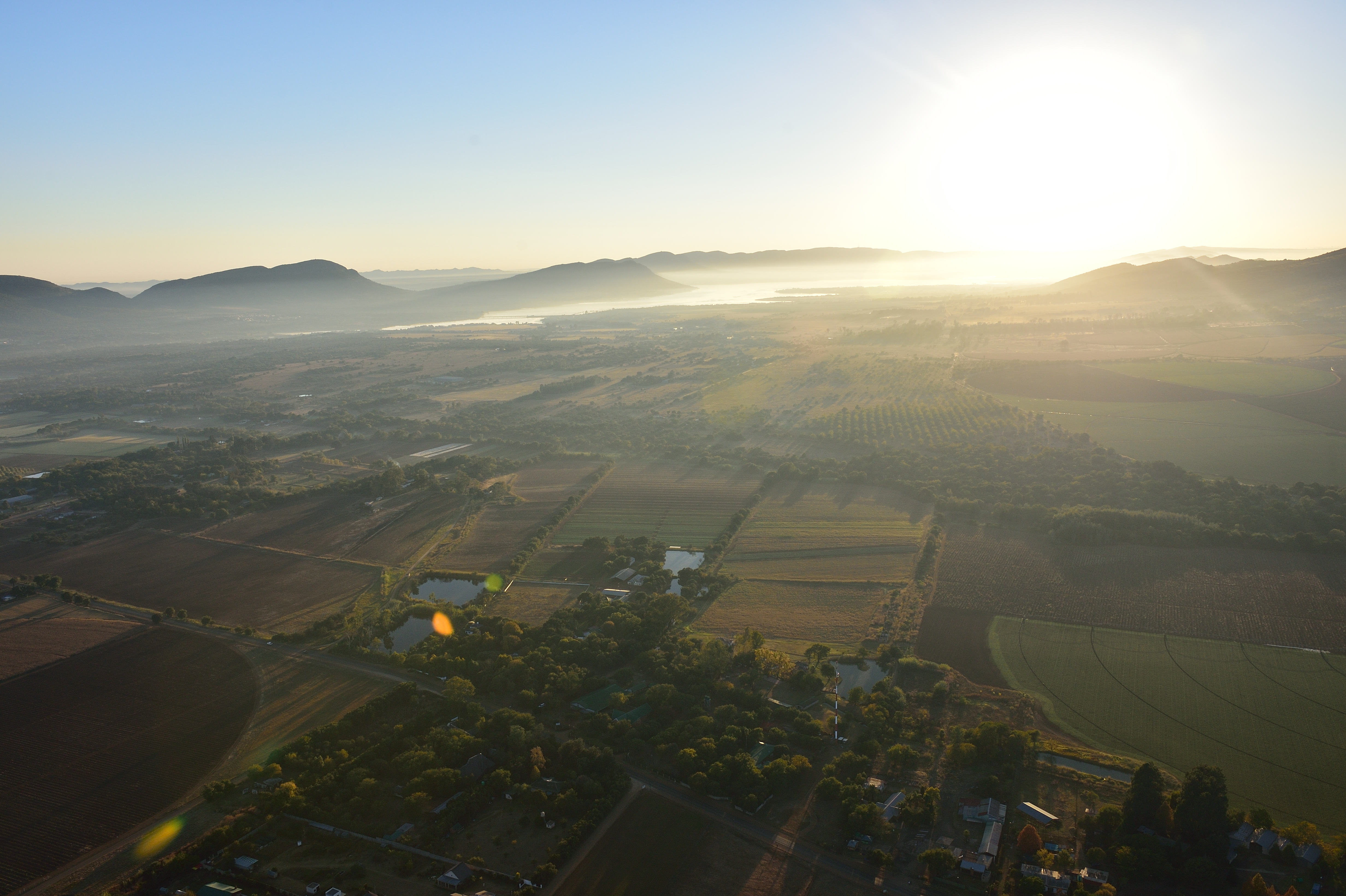 'n Vroeëoggenduitsig oor Skeerpoort vanuit 'n warmlugballon.